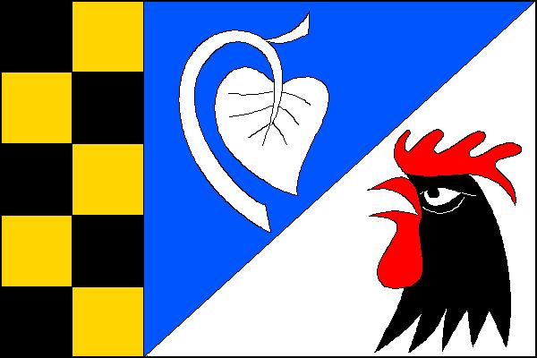 Vlajka obce Morašice (okres Chrudim)